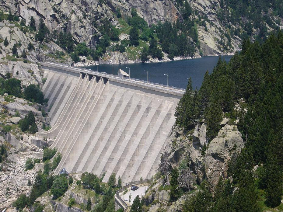 Embassament de Cavallers; la Vall de Boí, Alta Ribagorça, Catalunya